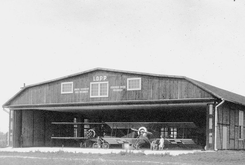 Ангар аеропорту на Левандівці.jpg: Ангар аеропорту "Левандівка" у Львові